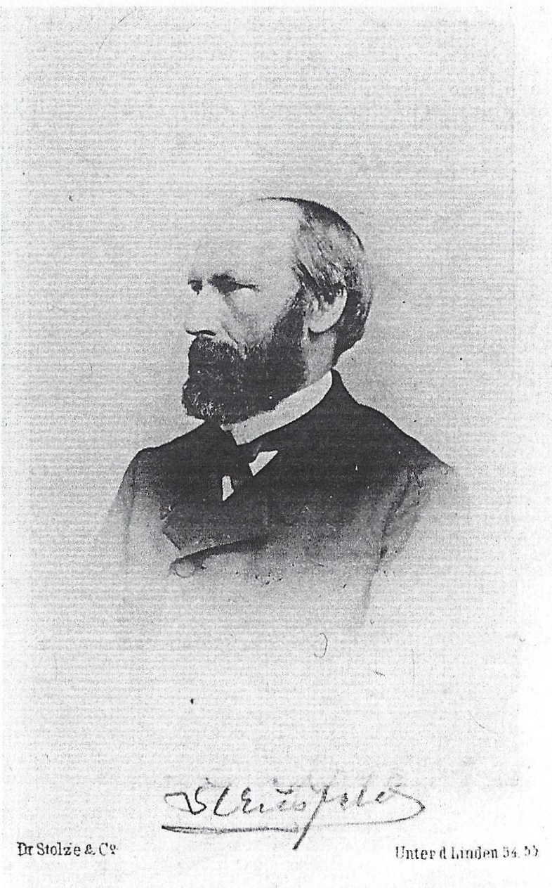 Signierte Porträtfotographie von Carl Ausfeld (1814-1900)